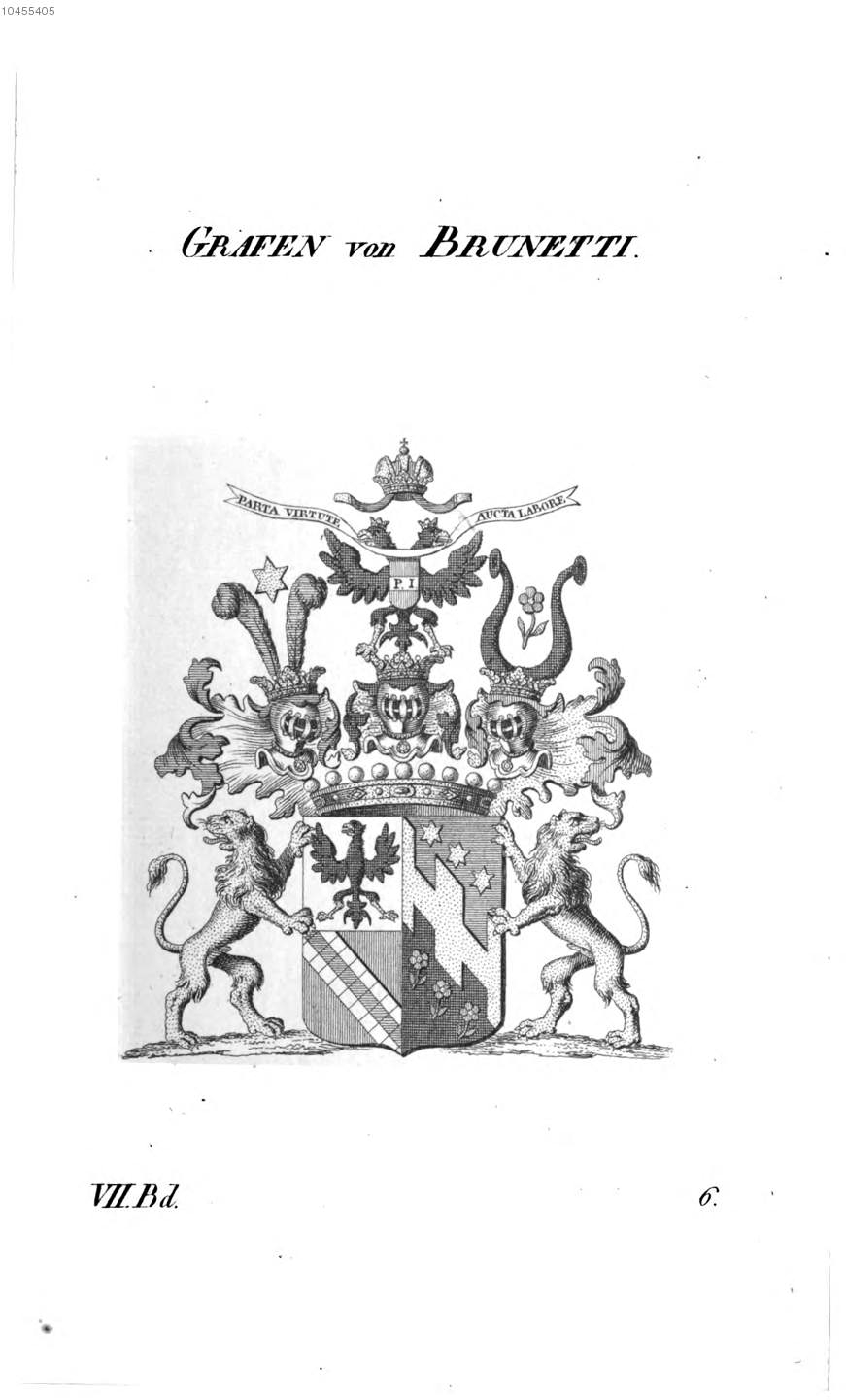 Wappen Brunetti - Tyroff AT.jpg